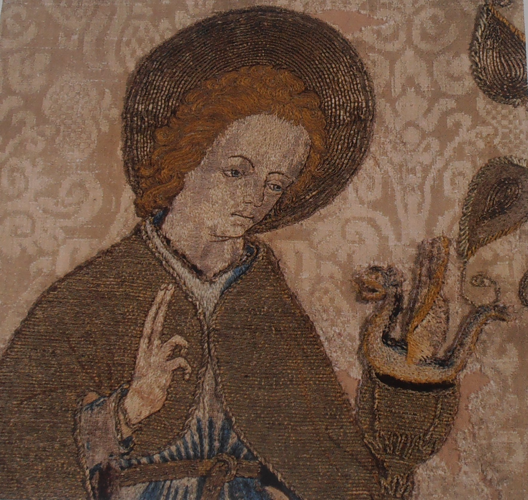 Detall del drap de faristol amb sant Joan Evangelista a Patmos